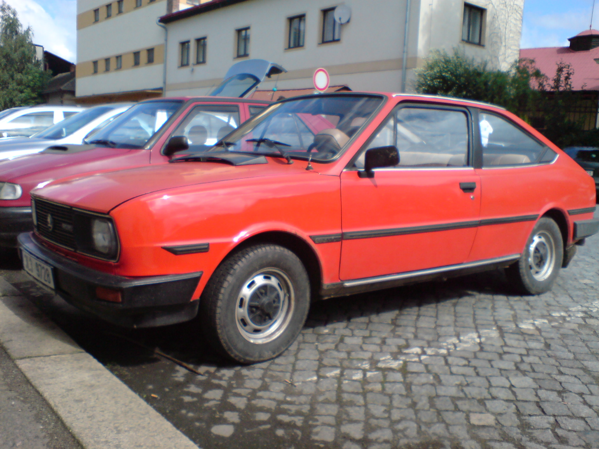 skoda garde